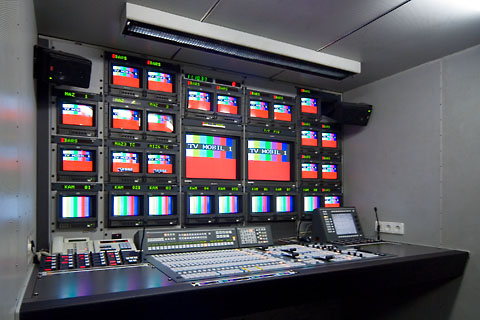 Bildregie UE 1